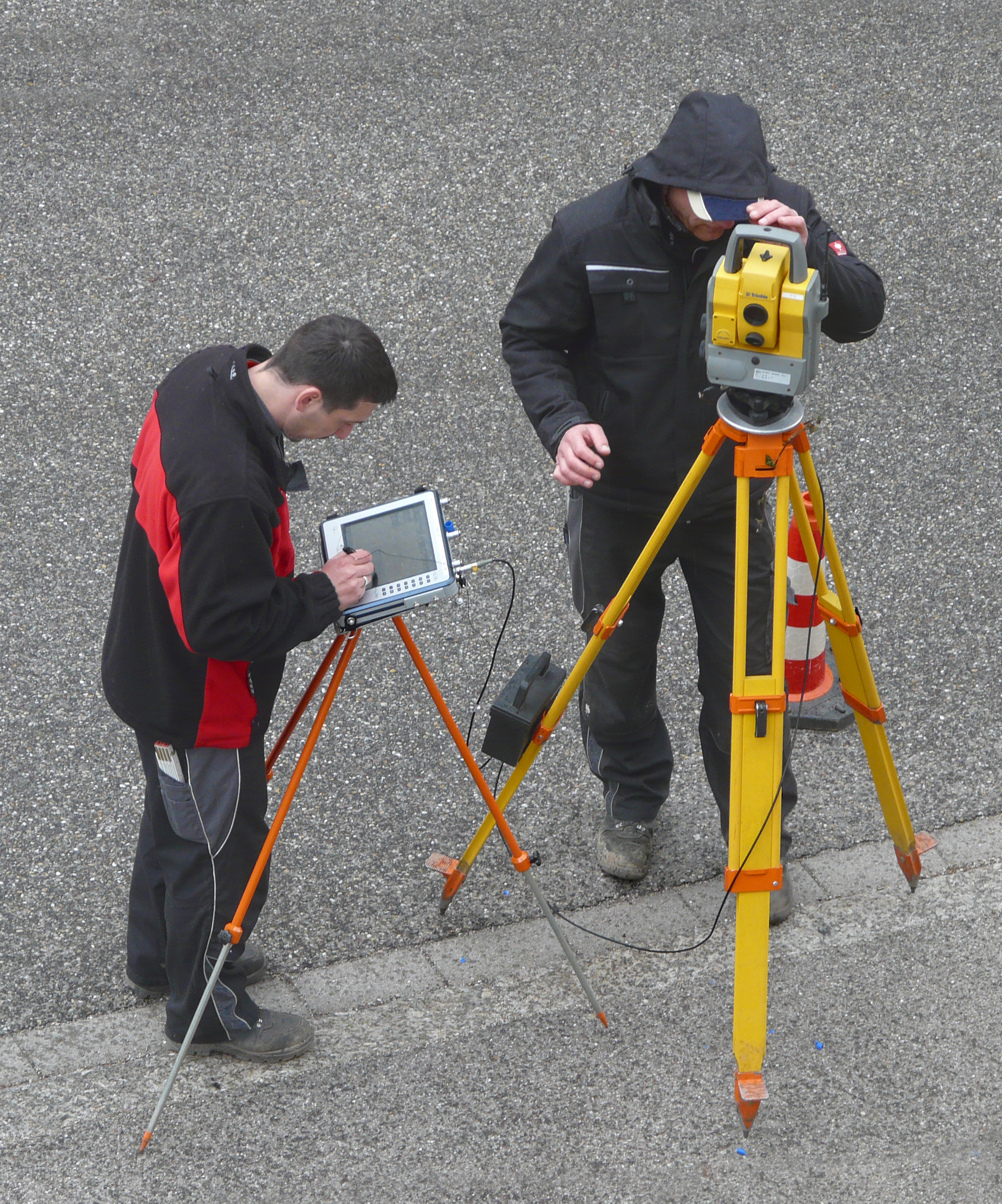 Bildinhalt: Zwei Vermesser mit Trimble Total Station DR 200+ Aufnahmeort: Baden-Baden, Deutschland